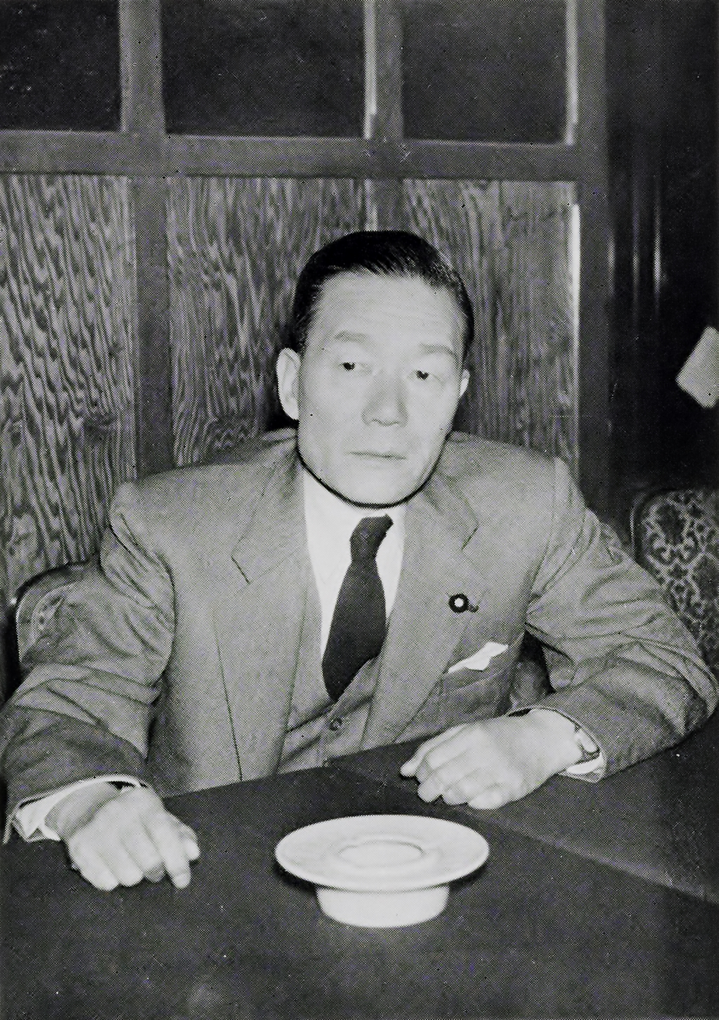 椎名悦三郎の写真。